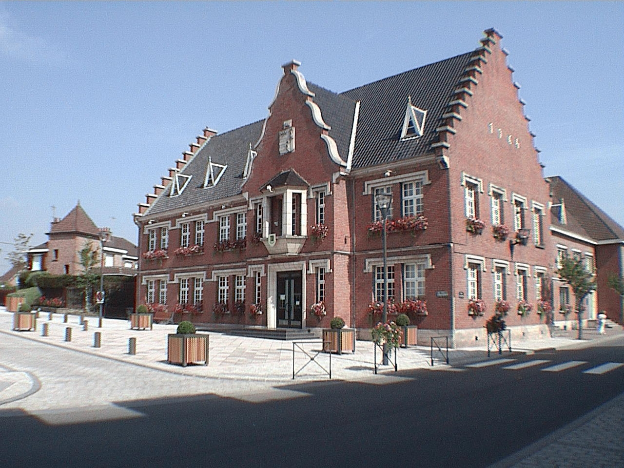 La mairie et la place Jean-Marie Ryckewaert, à Steenvoorde.